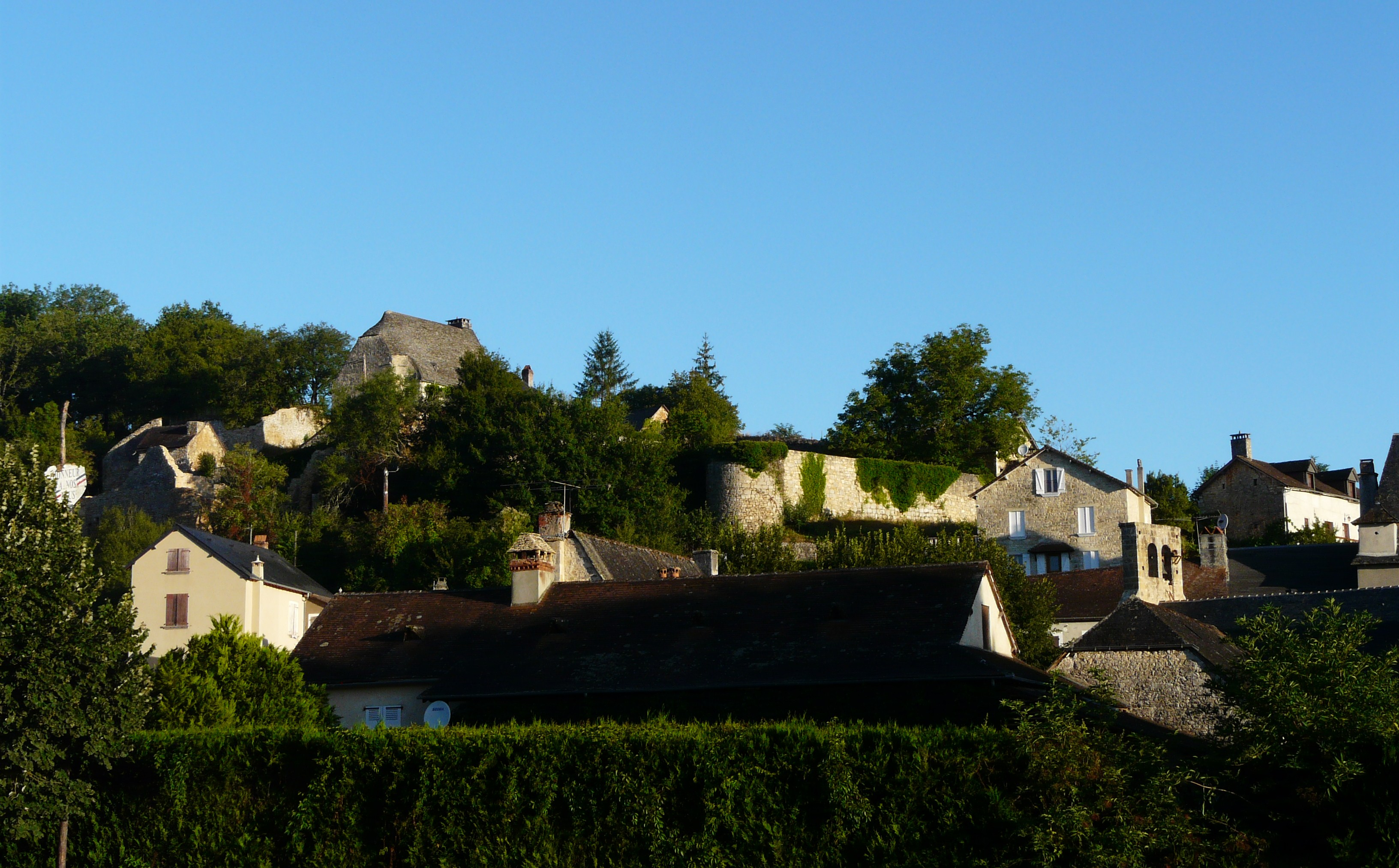 Le village de Coly, Dordogne, France.